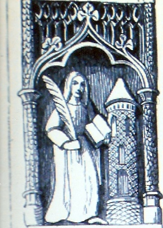 Il s'agit d'un dessin de Sainte-Barbe avec une plume de Martyre du poteau cornier disparu de Saint-Julien du Sault (France) sur "Abécédaire ou rudiment d'archéologie: architectures civile et militaire" Arcisse de Caumont paru en 1869.